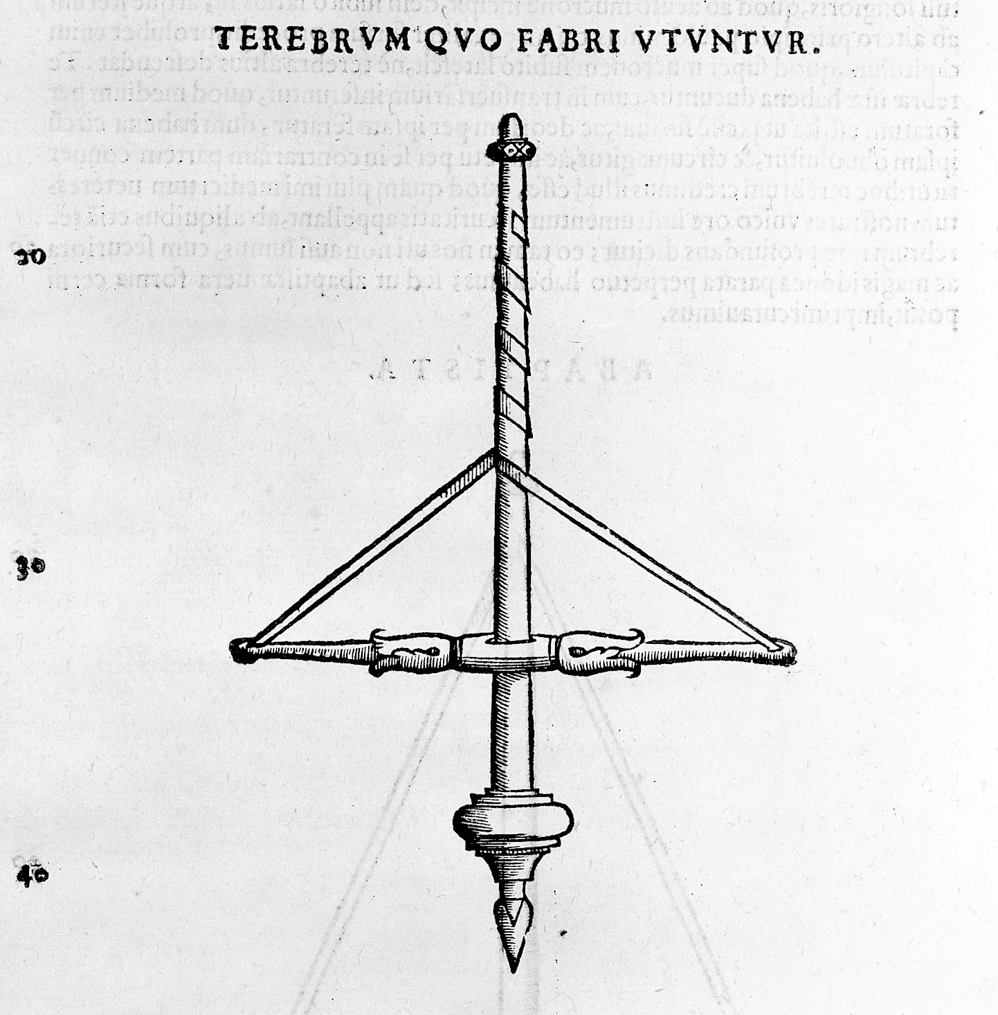 Folio 41 recto. Rare Books Keywords: giovanni andrea della croce; SURGERY